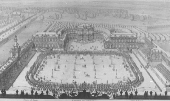 Karussel der Elemente im Zwinger anläßlich der Vermählung des Kurprinzen 1719